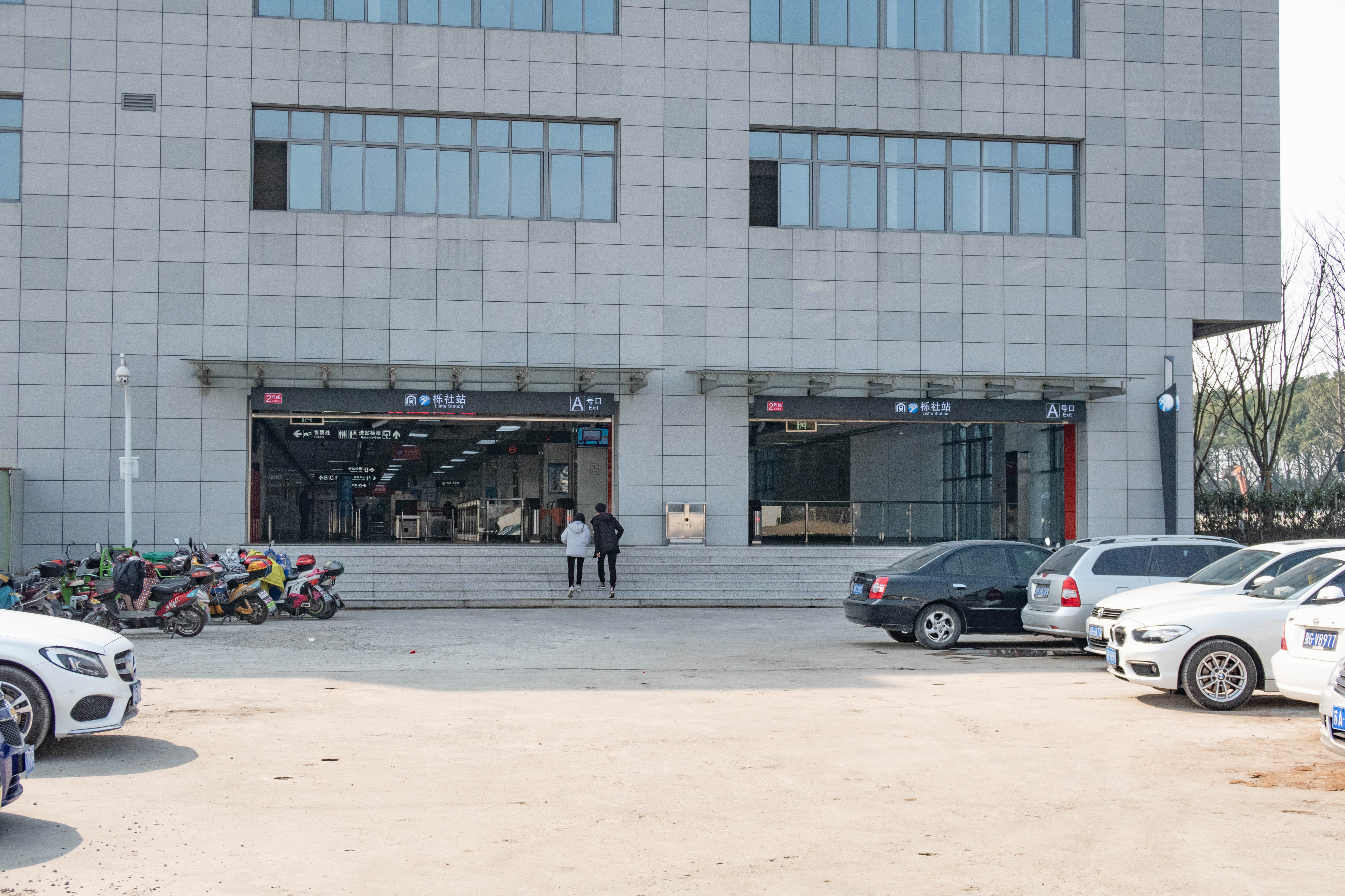 宁波地铁栎社站